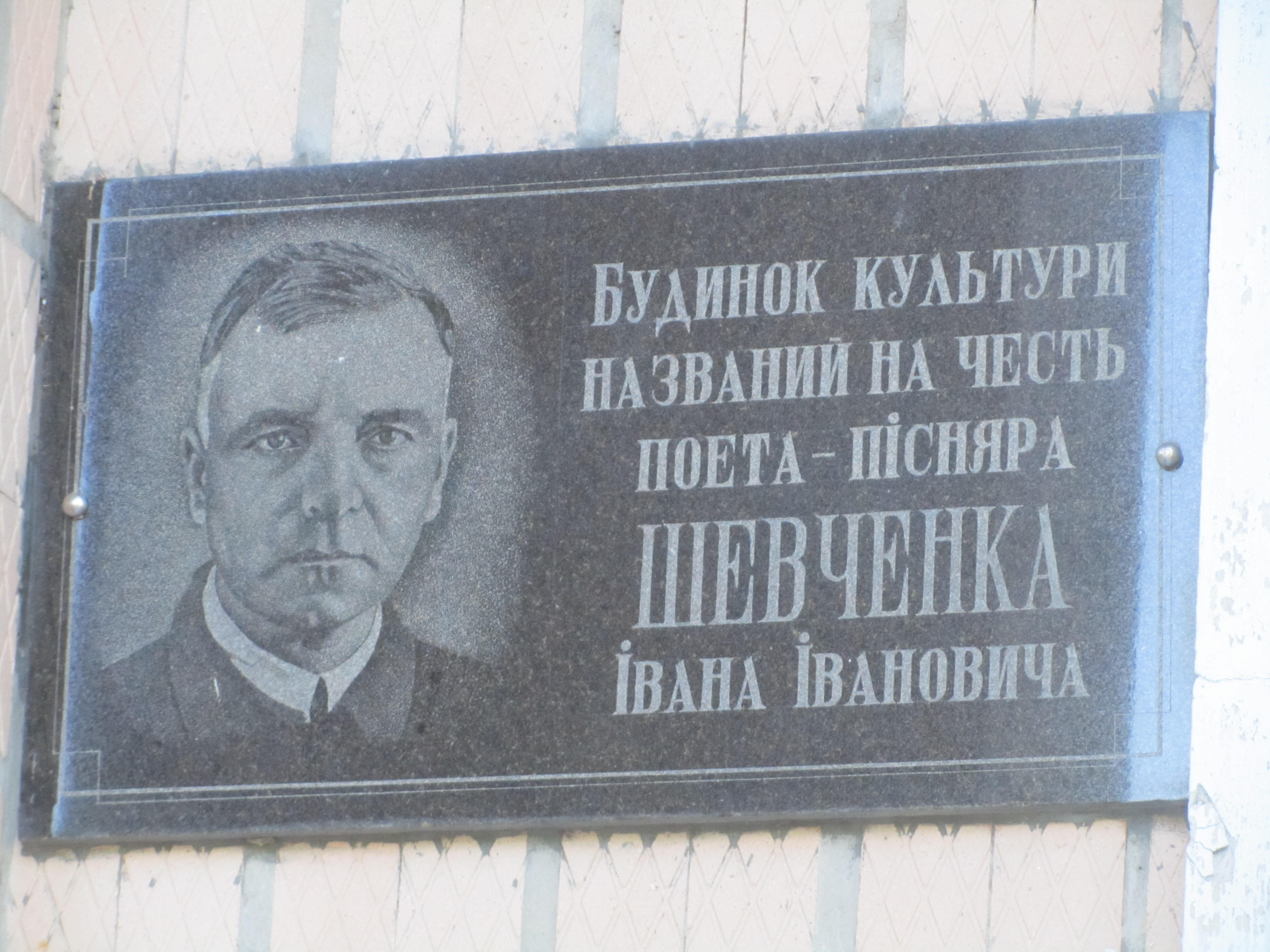 Меморіальна дошка на честь Шевченка Івана Івановича на будинку культури у смт Павлиш Онуфріївського району